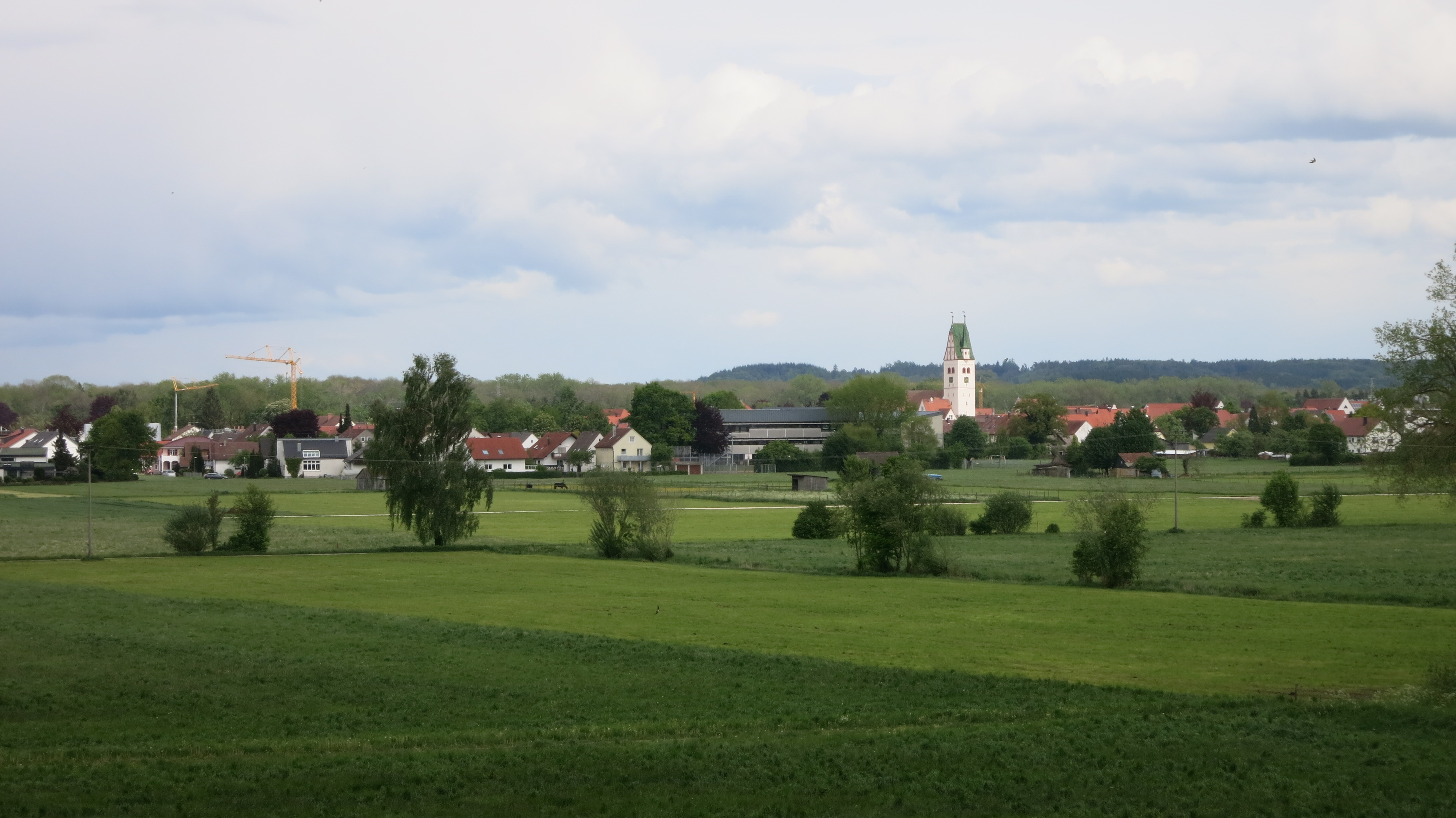 Deitsch: 89165 Dietenheim, Blick auf den Ort von Westnordwest über das Landschaftsschutzgebiet 4.25.106 „Dietenheim“ hinweg.